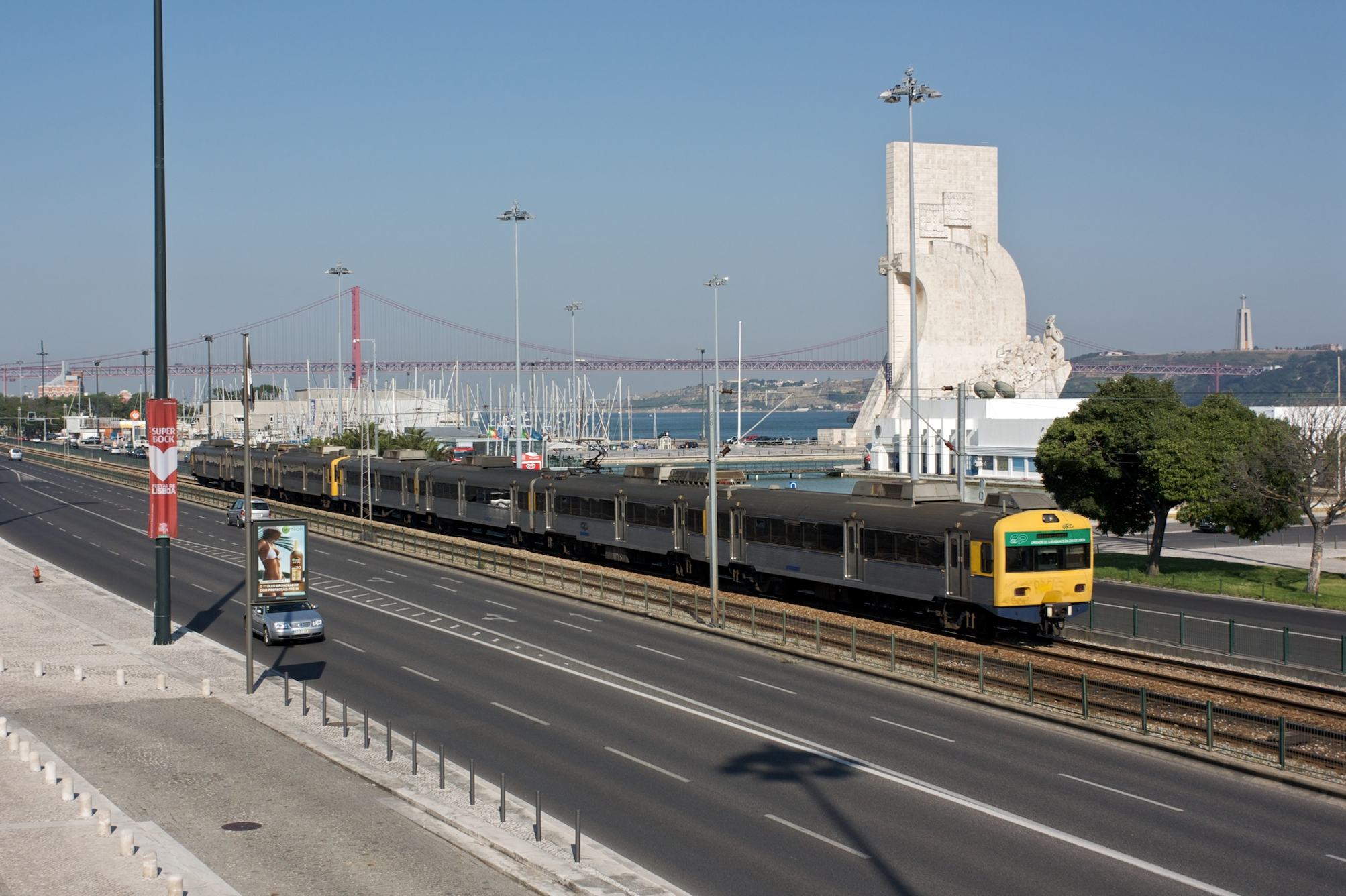 Tipo: Comboio Urbano 19735 [Cais do Sodré - Oeiras] Local: Belém [Linha de Cascais, PK 5] Data e hora: 30 de Junho de 2010 [17h56] Material: Automotoras 3260 e 3162 [Unidade Quádrupla Eléctrica + Unidade Tripla Eléctrica]